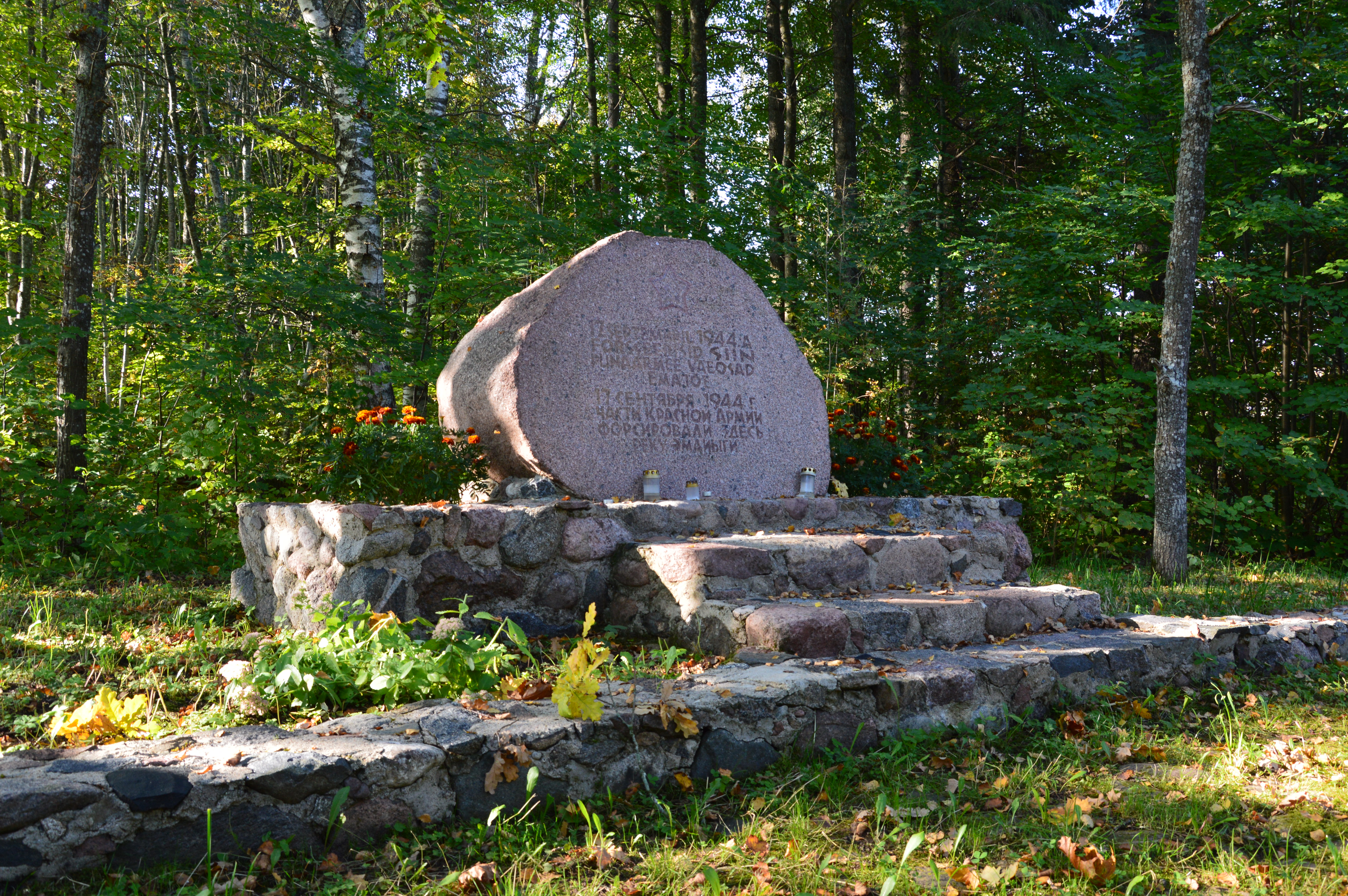 Veskimäe küla, Mäksa vald.